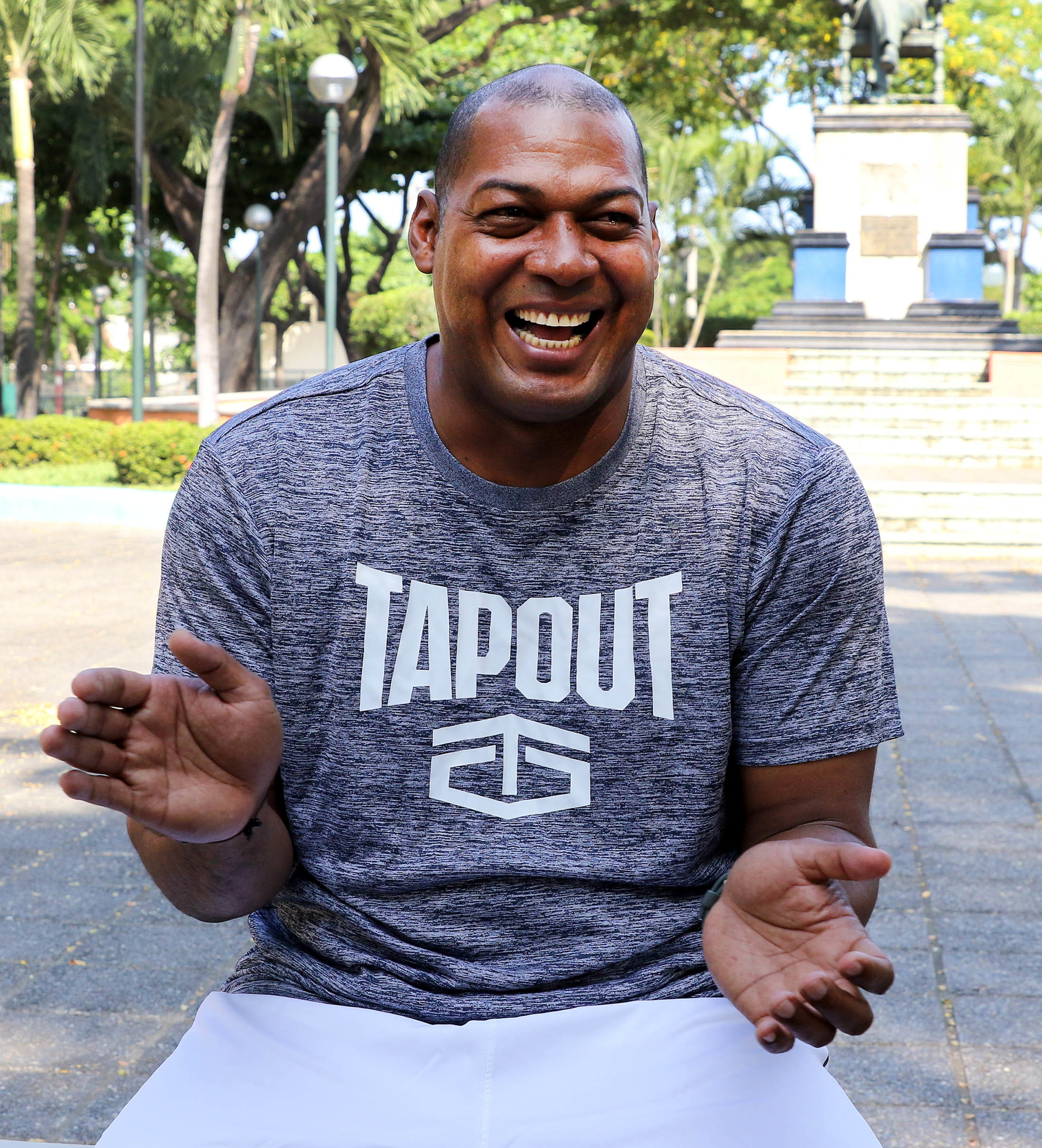 Guayaquil, miércoles 15 de junio del 2016 (Andes).-Eduardo "Tanque" Hurtado exjugador de la selección ecuatoriana de fútbol, recuerda su participación en el partido frente a EEUU en la Copa America que se realizó en Ecuador. Foto:Andes/César Muñoz